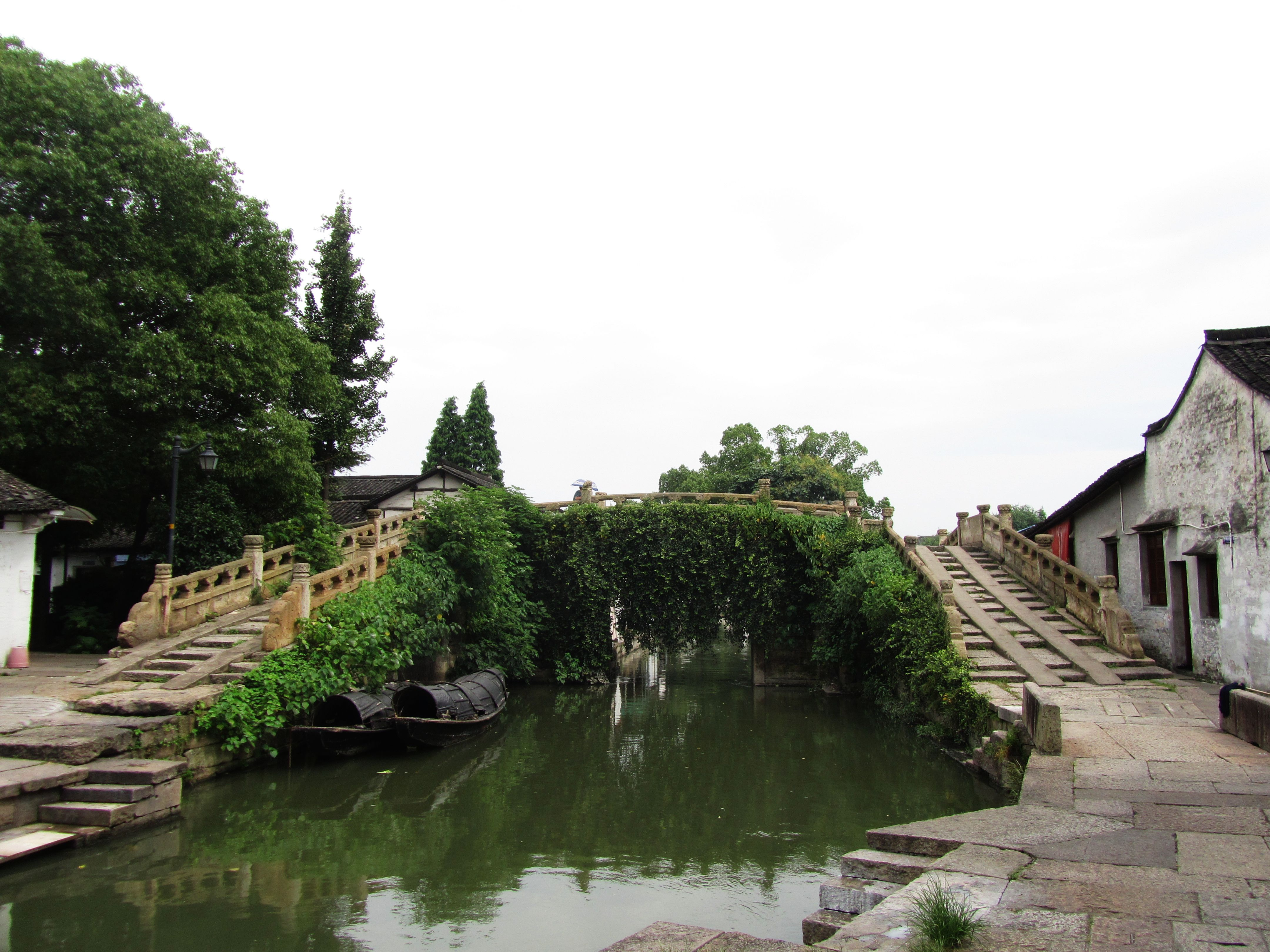 绍兴宋代桥梁八字桥，自南侧看。